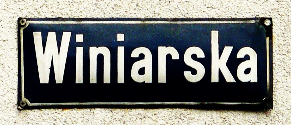 Stara tablica z nazwą ulicy - relikty starych Winiar w Poznaniu.